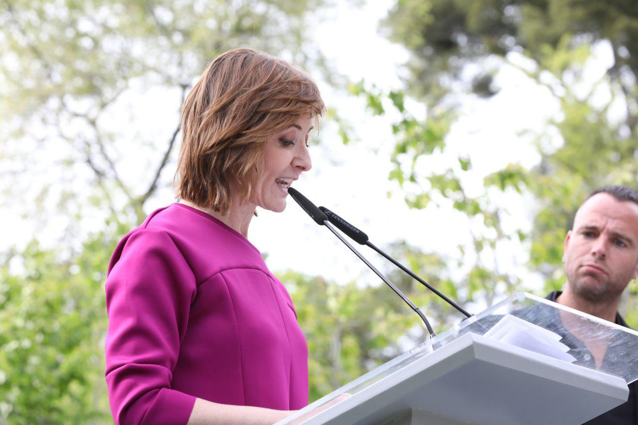 “Yo no sé de dónde salía tanta gente armada. Cualquiera habría creído en la existencia de una conjuración silenciosamente preparada; pero el arsenal de aquella guerra imprevista y sin plan, movida por la inspiración de cada uno, estaba en las cocinas, en los bodegones, en los almacenes al por menor […] todas las calles de Madrid presentaban el mismo aspecto; habíase propagado la insurrección como se propaga la llama en el bosque seco azotado por impetuosos vientos”.